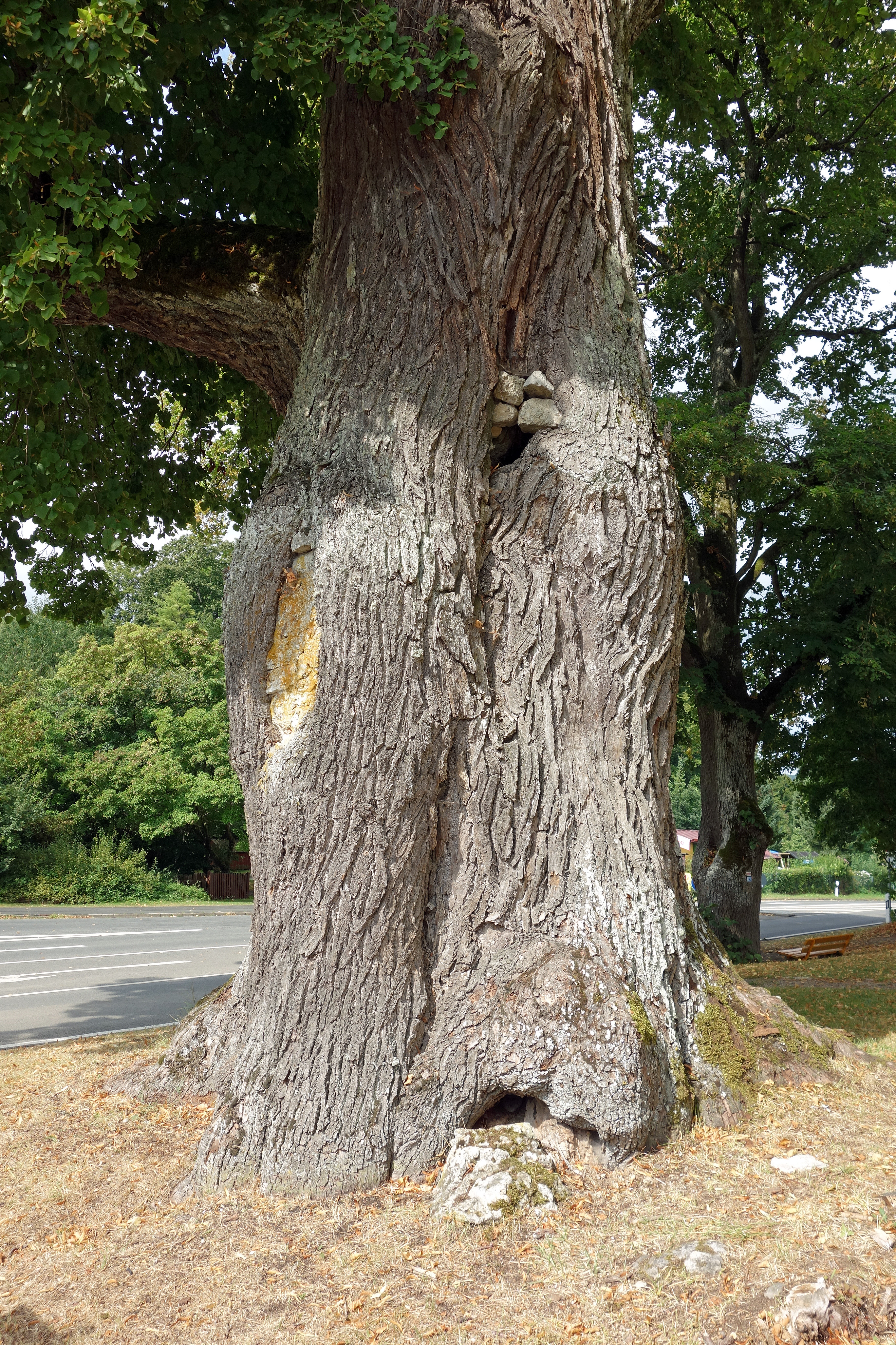 Badangerlinde